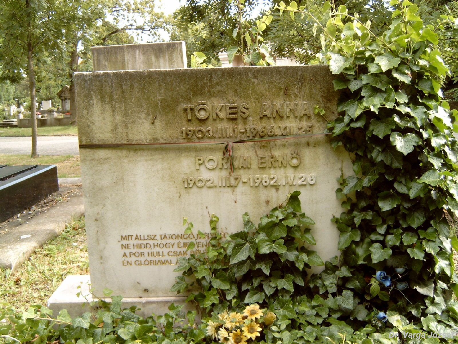 Tőkés Anna, Anikó (1903. március 1. Marosvásárhely - 1966. december 25. Budapest) Annie színésznő sírja Budapesten. Farkasréti temető: 1-1-447/448.